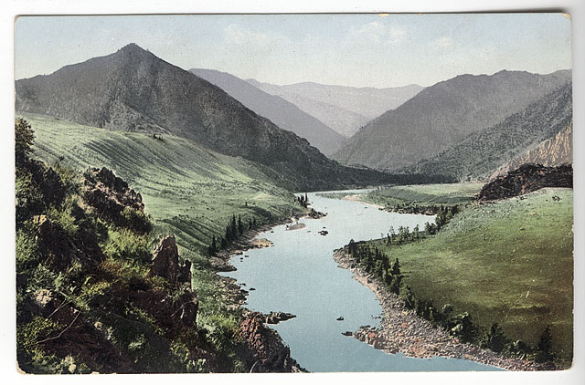 Долина реки Катунь около впадения реки Тогус-Кан